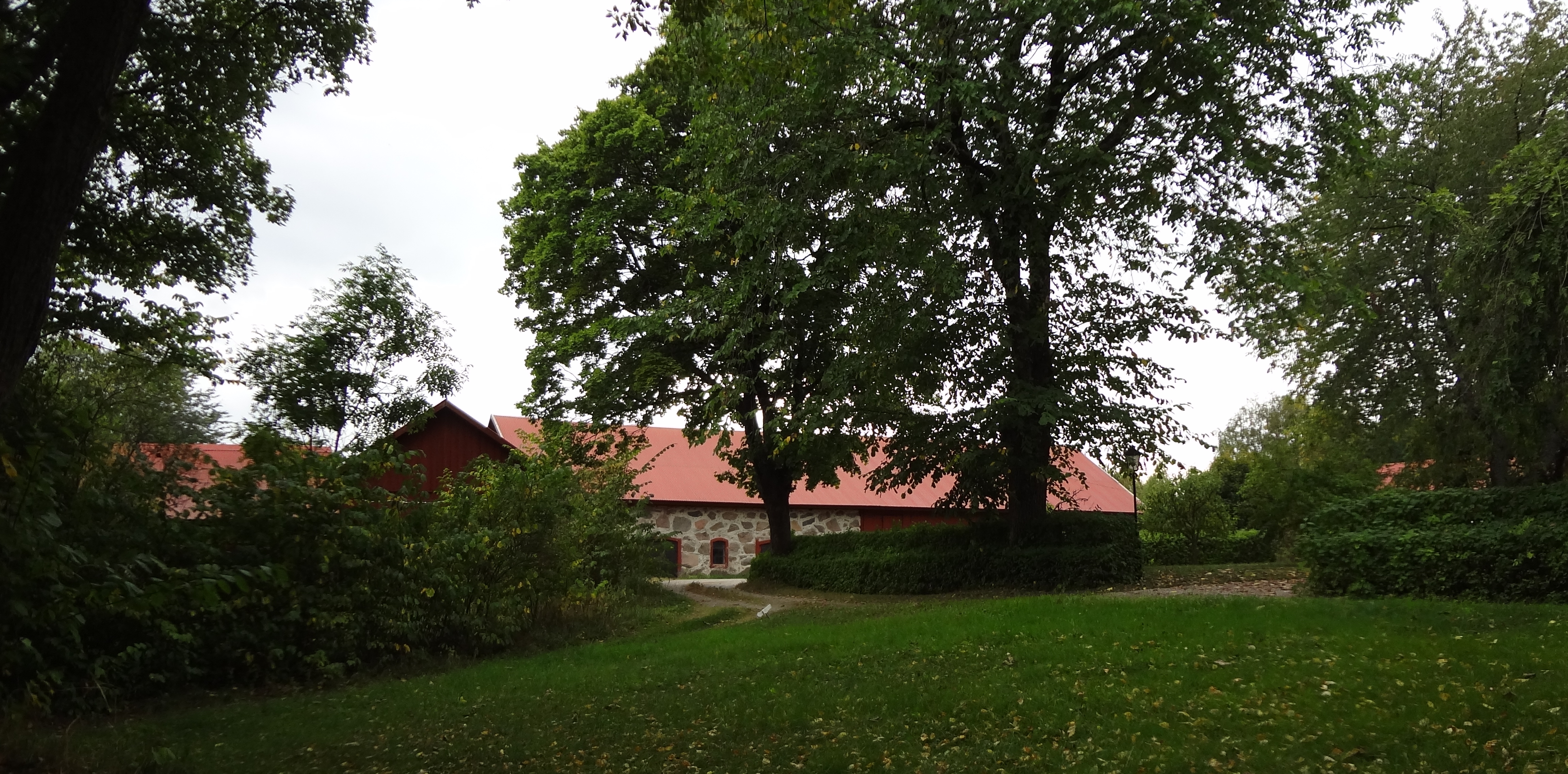 Den gamla gården i stadsdelen Flacksta i Eskilstuna.